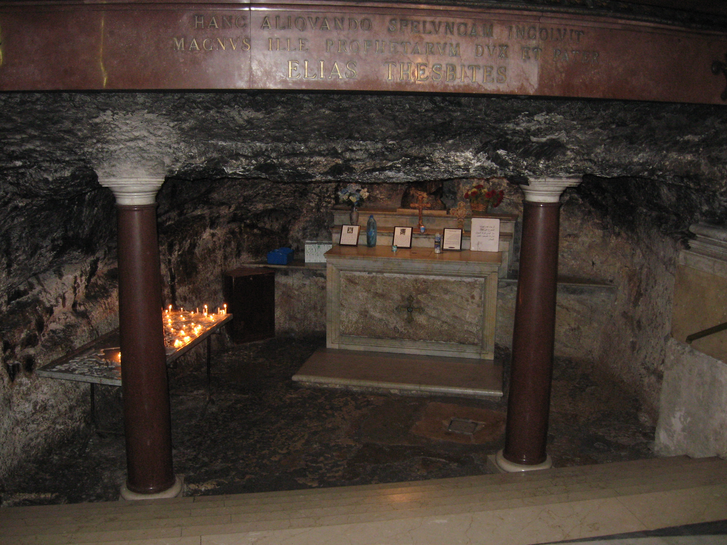 Grota Eliasza w Hajfie